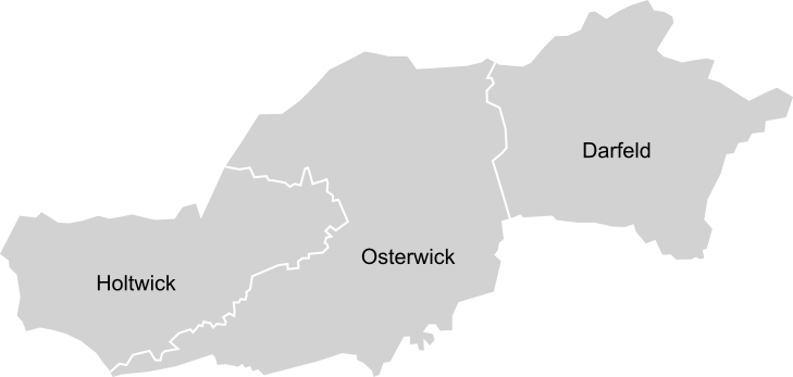 Rosendahler Ortsteile